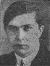 Gunnar Sundbärg